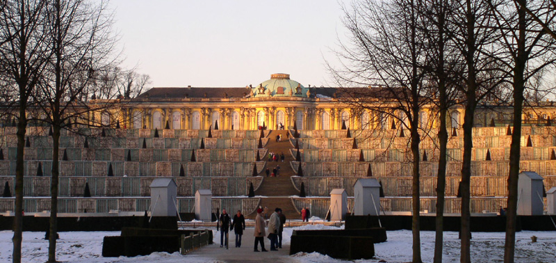 Schloss Sanssouci im Winter 2006